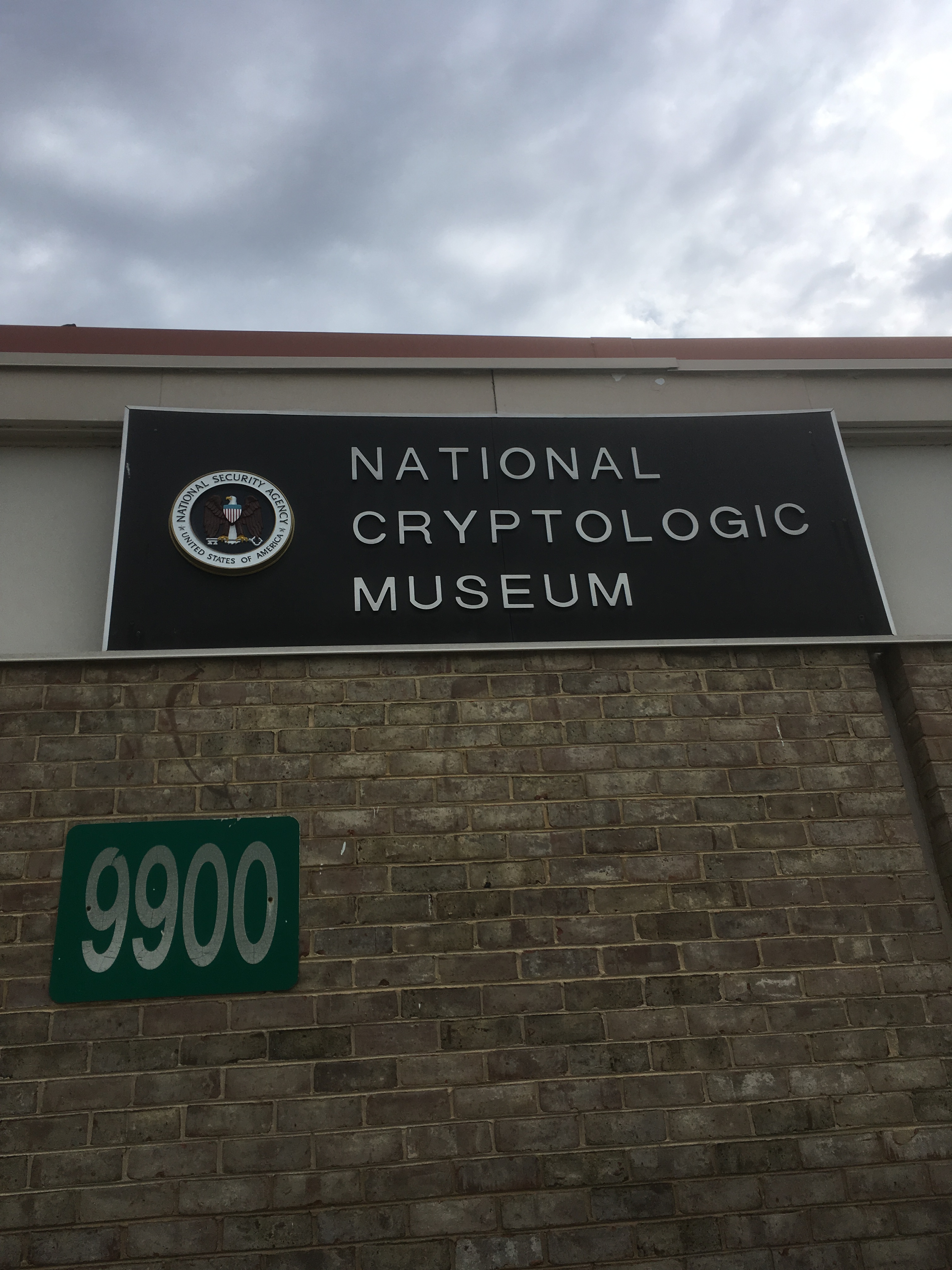 アメリカ暗号博物館